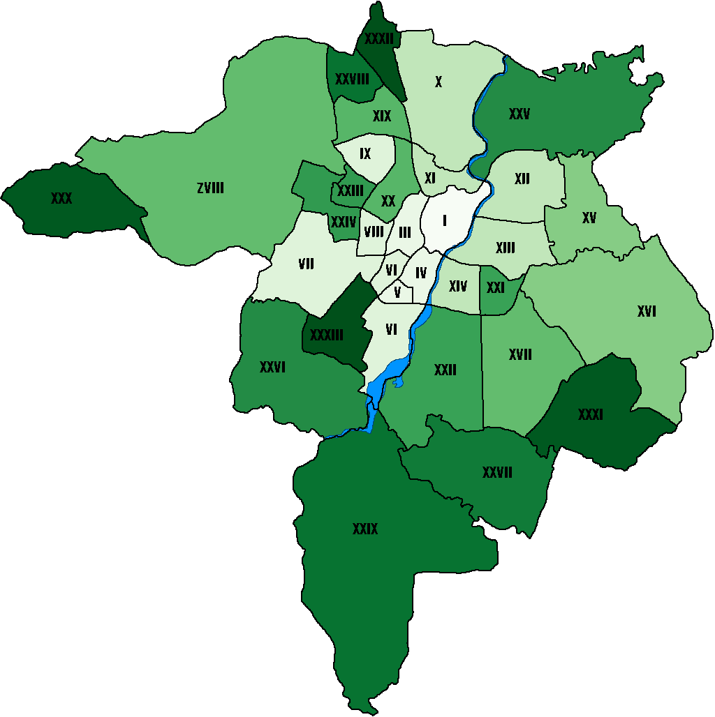 Osiedla w Rzeszowie (stan z dnia 24 sierpnia 2019 roku)